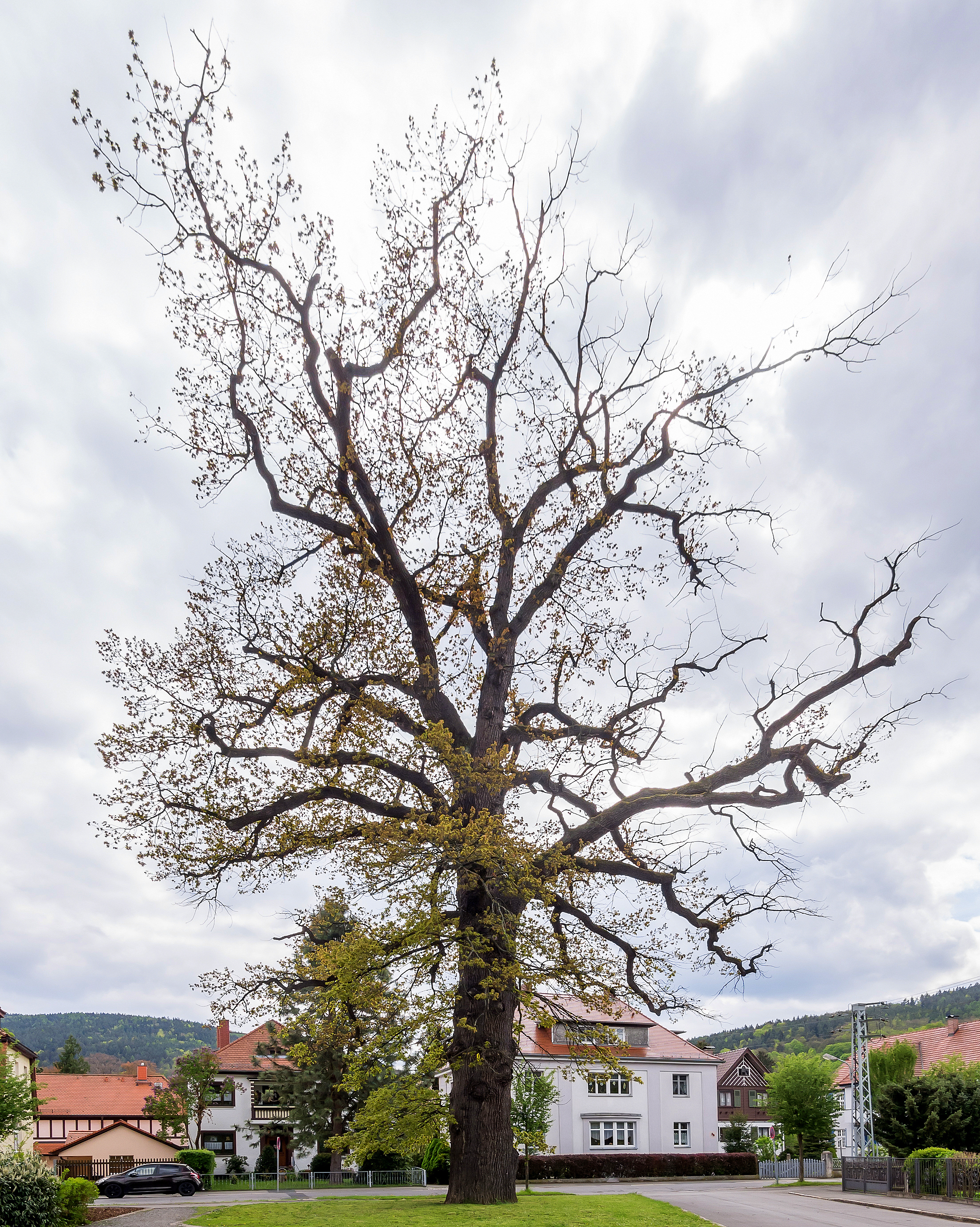 Fröbel-Eiche Listen Nr. 9 Bad Blankenburg I